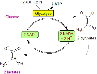 Fermentation lactique : la glycolyse se prolonge par la réduction du pyruvate en lactate.